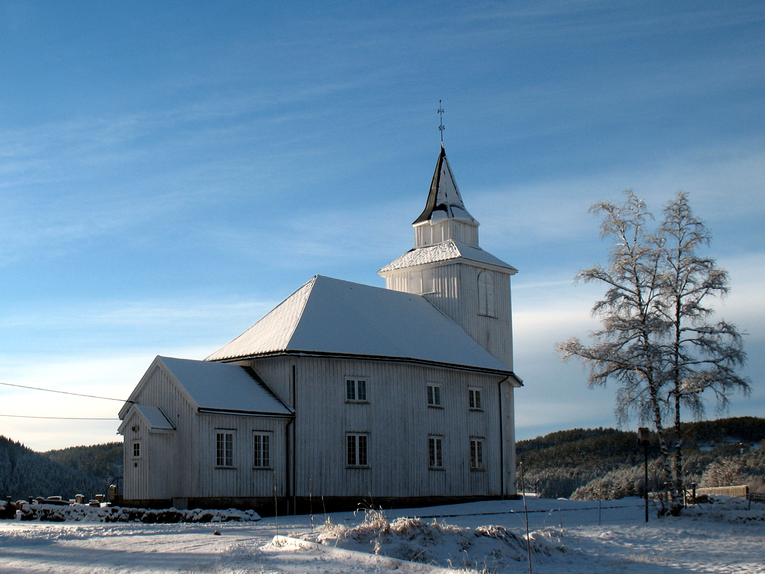 Hægeland kirke er en åttekantet kirke i tre fra 1830 på Hægeland i Vennesla kommune, Vest-Agder. Den brukes av Hægeland menighet som er en del av Vennesla fellesråd, Otredal prosti i Agder og Telemark bispedømme. Fra nord.